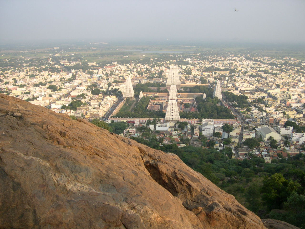 Arunachaleshwara / Annamalaiyar Temple from Annamalai Hill